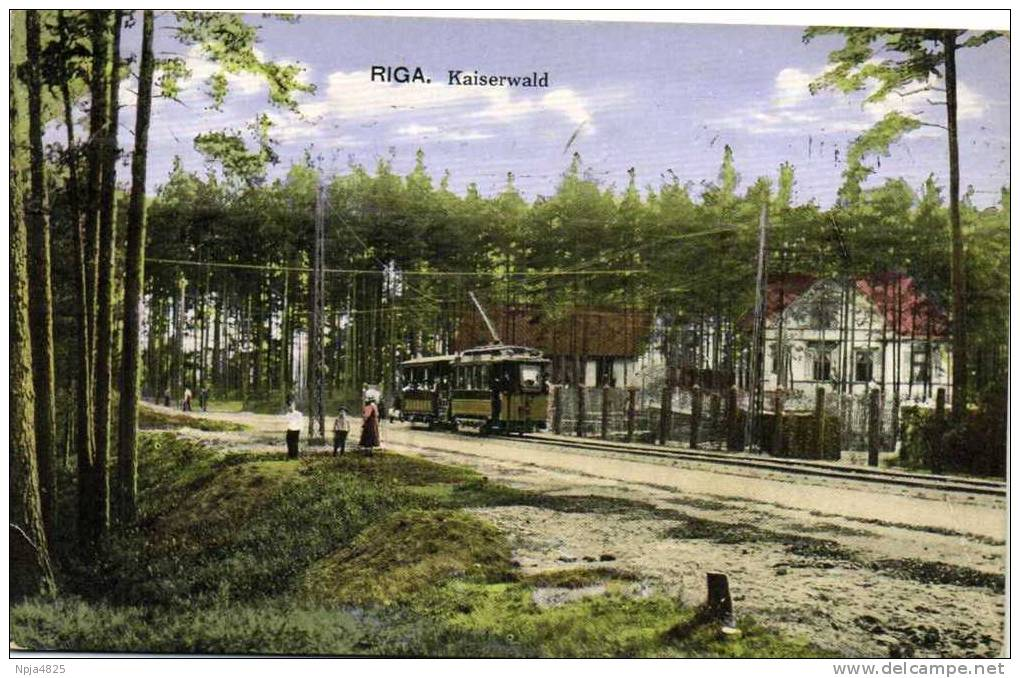 Mežaparks in Riga, Latvia.